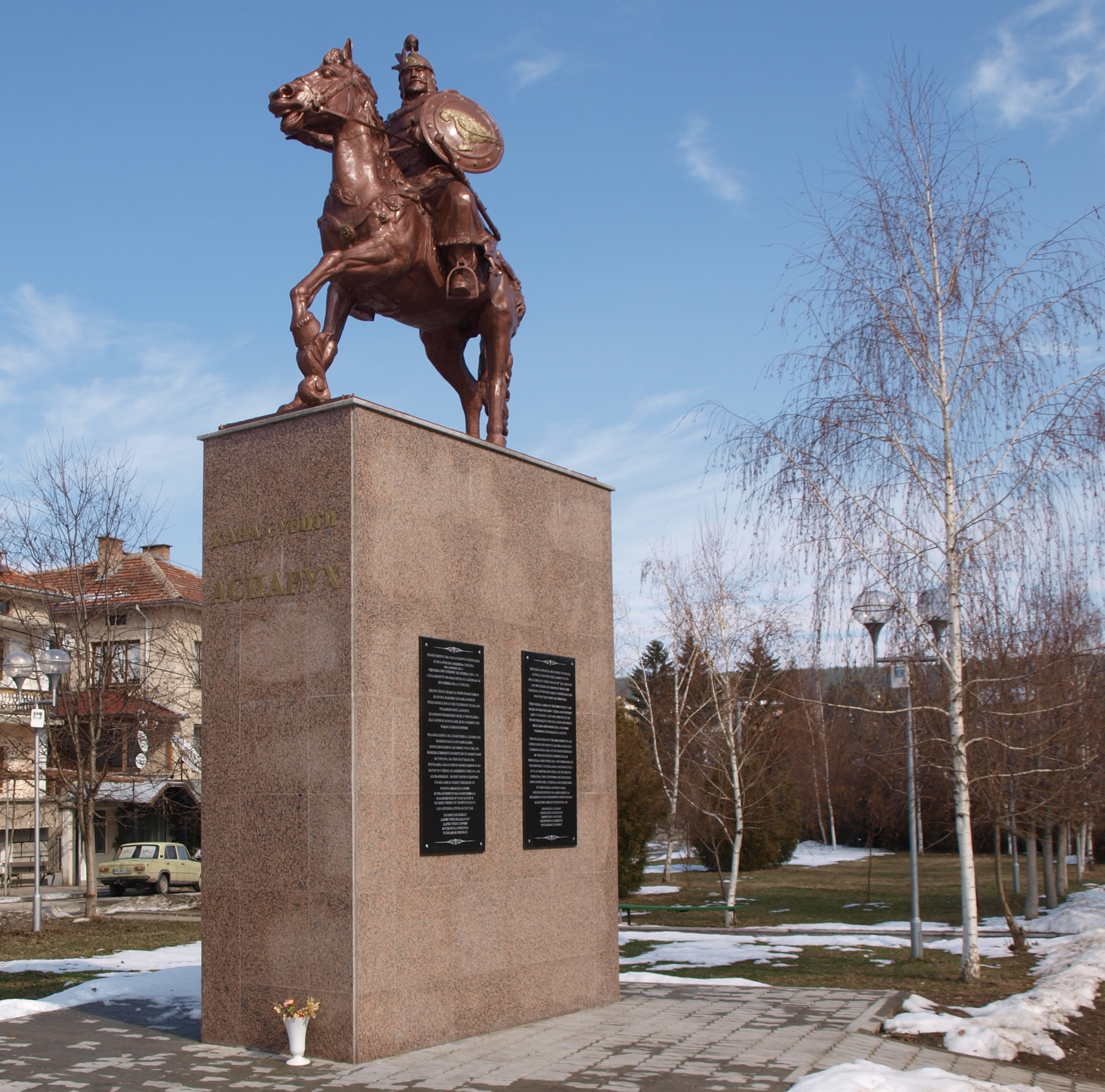 Паметника на кан Аспарух в Стрелча.